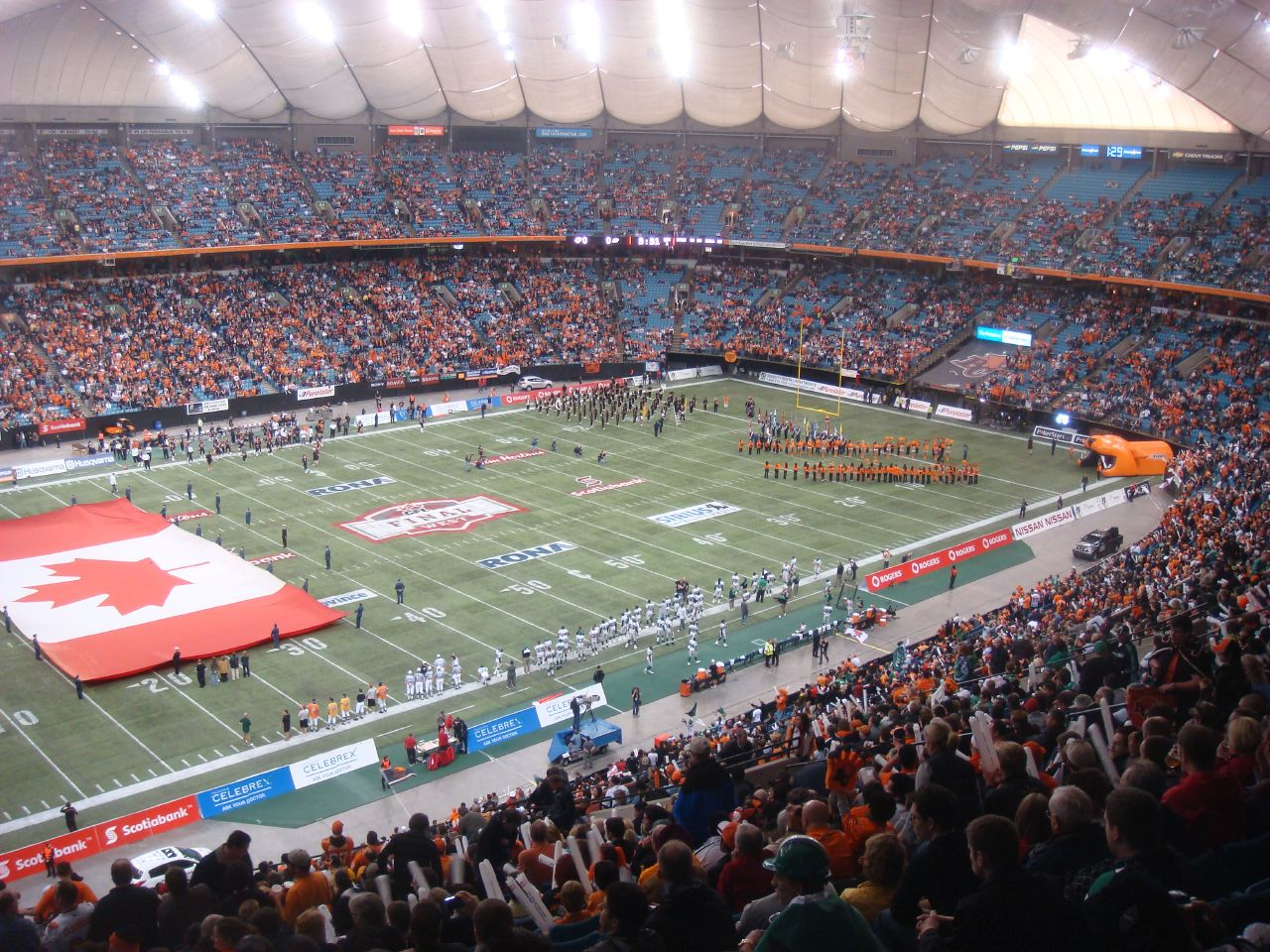 BC vs SK